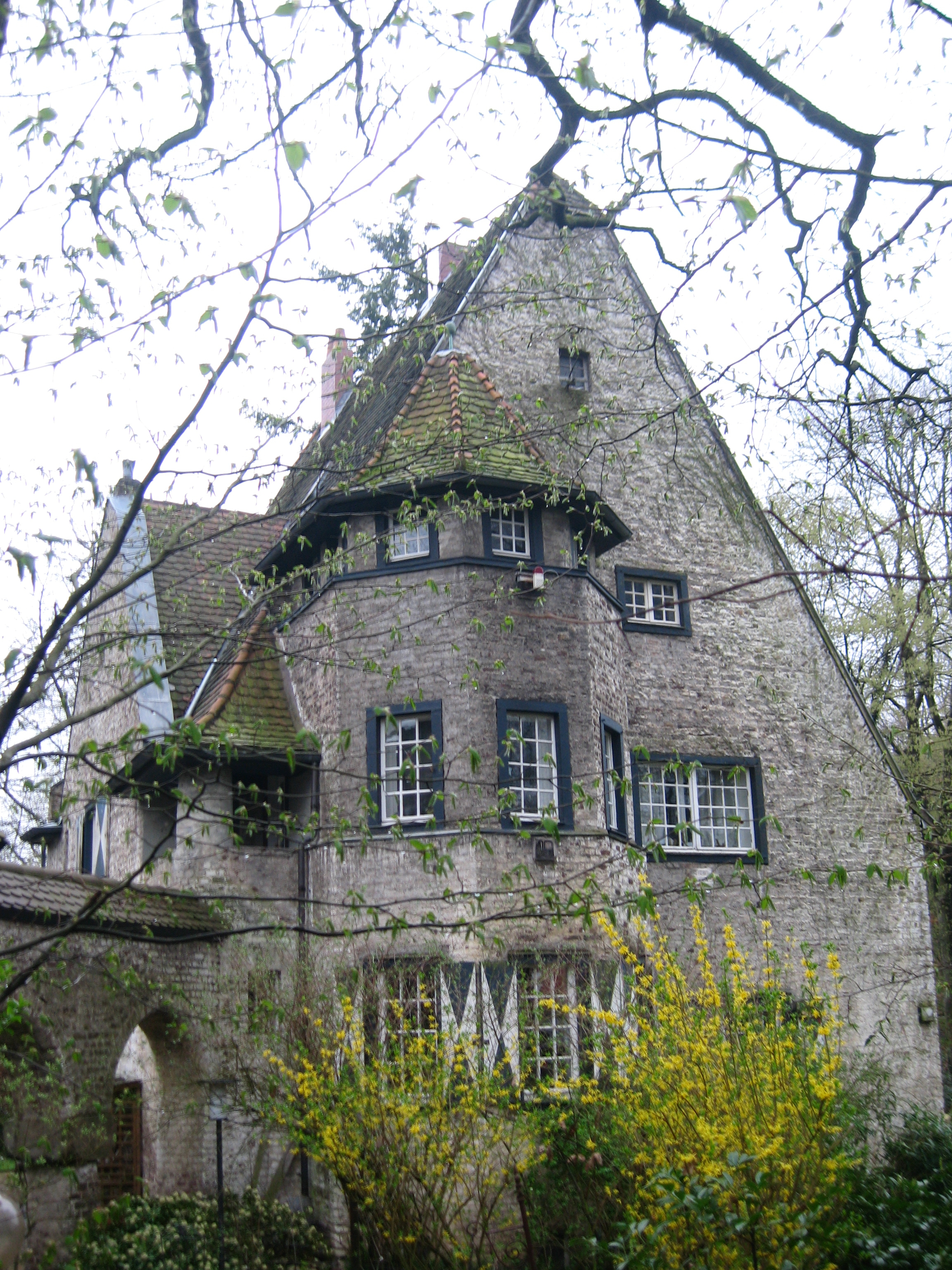 Haus Moest Köln-Rath-Heumar (Schlossanlage Röttgen) Datum: 03.04.2011 Urheber: M. Pfeiffer alias Benutzer:Gordito1869 Quelle: privates Fotoarchiv des Urhebers This is a photograph of an architectural monument.